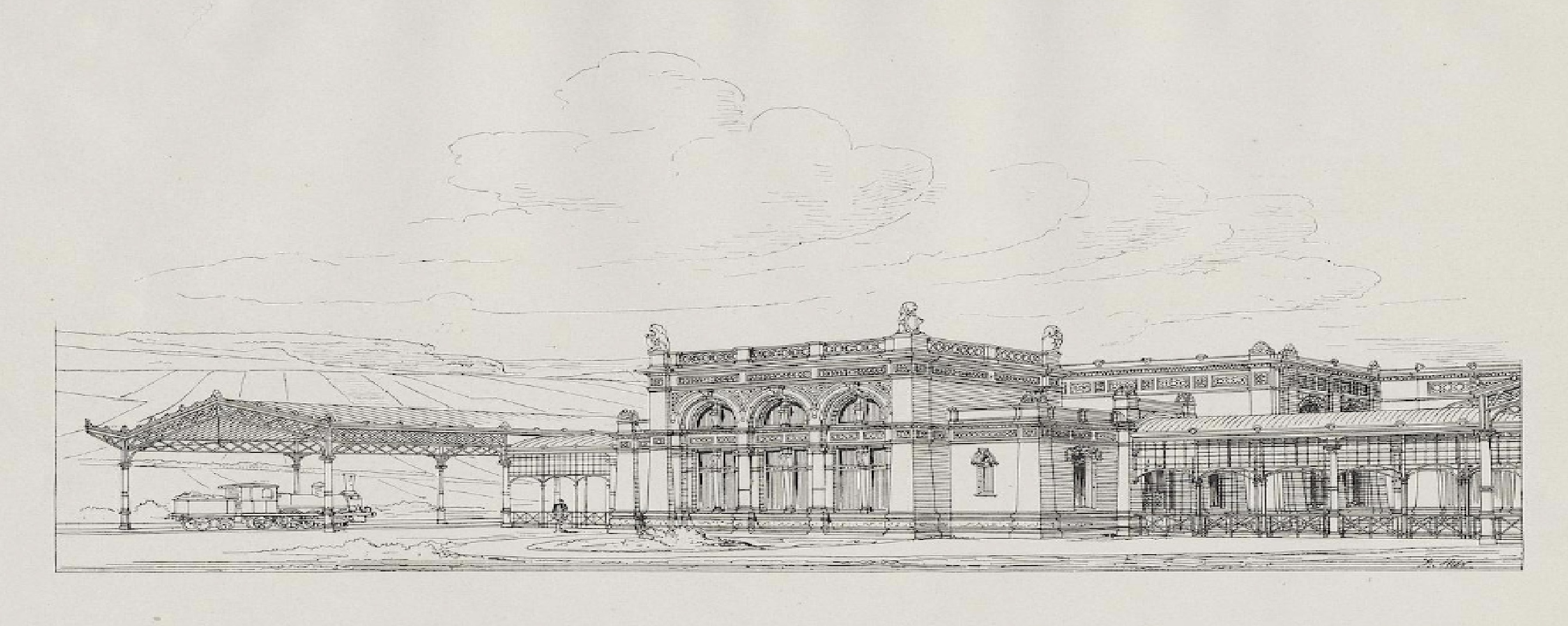 Teilscan der Tafel 66 in Architektonische Rundschau 1891 / 9